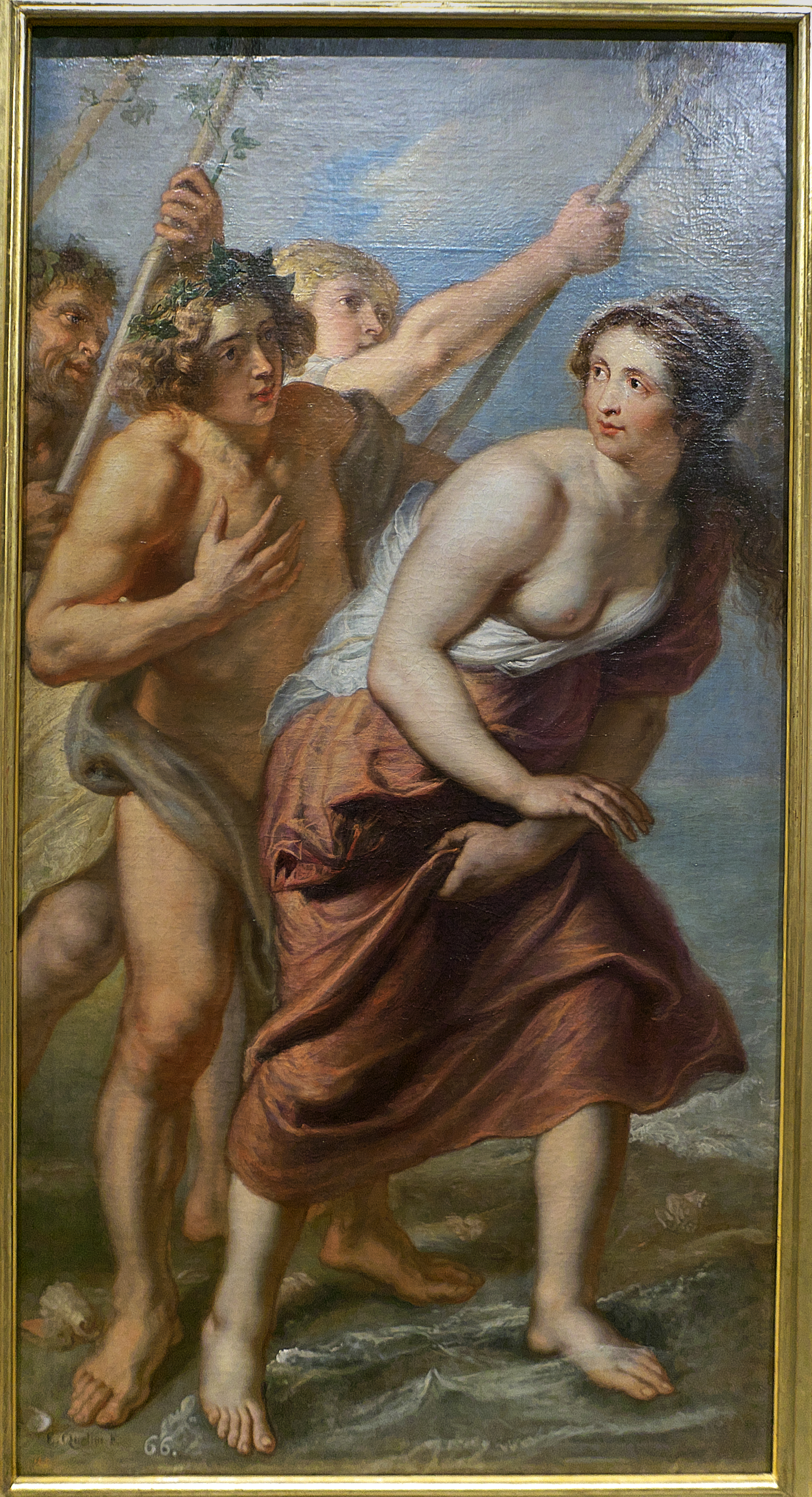 Óleo sobre lienzo (1636-1638). Uno de los seis cuadros que Erasmus Quellinus pintó por encargo de Rubens para la decoración de la Torre de la Parada, siguiendo boceto de éste, basado en la obra de Las Metamorfosis. Baco encuentra a Ariadna abandonada en la isla de Naxos, se casa con ella y la lleva al Olimpo. Bocetos de Rubens el el Museo Boijmans Van Beuningen